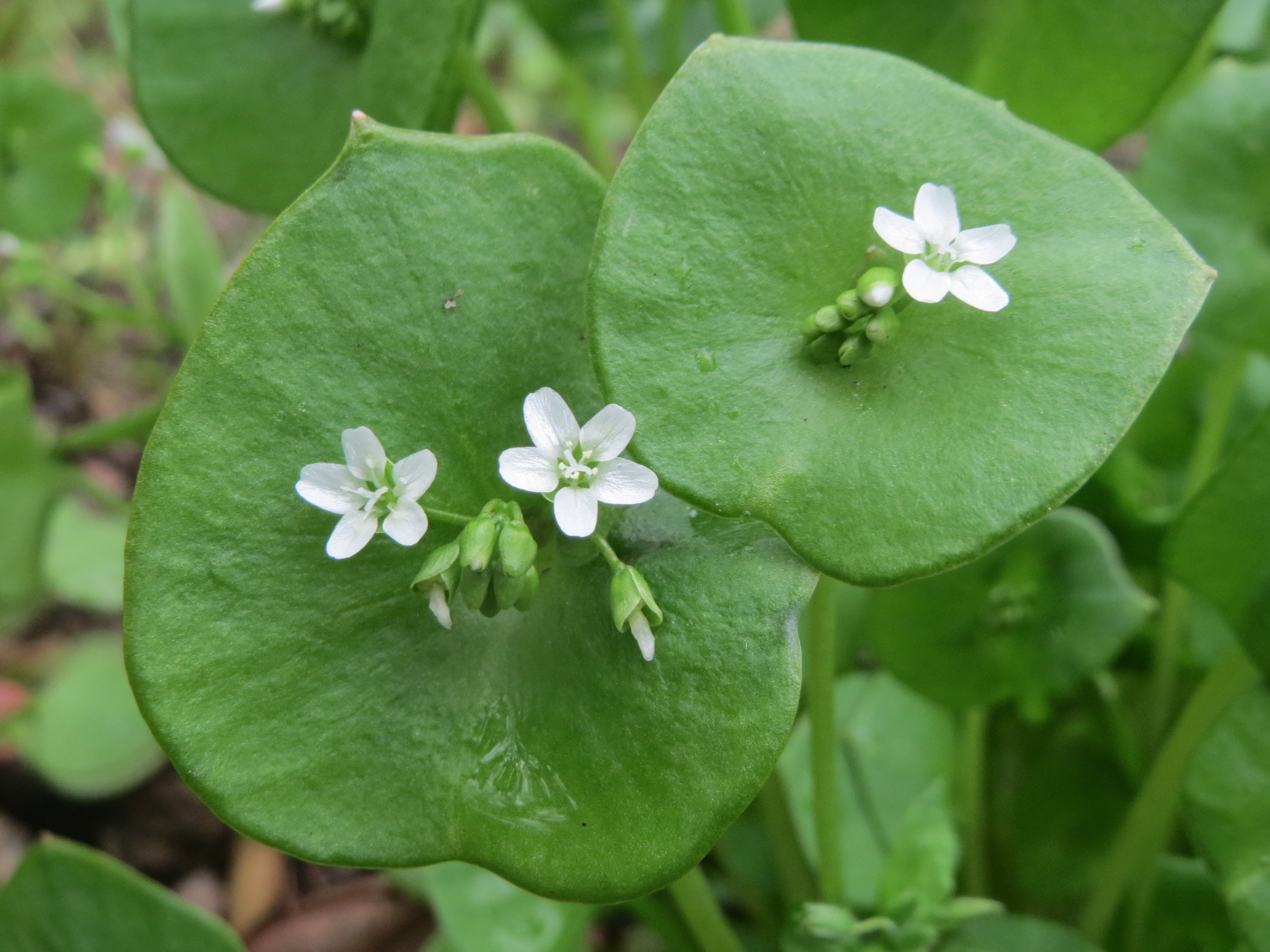 Gewöhnliche Tellerkraut (Claytonia perfoliata) in Hockenheim